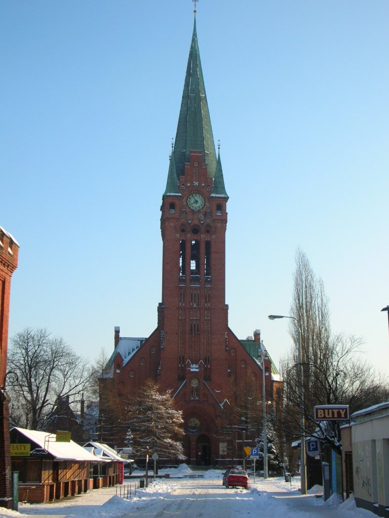 Kościół pw. św. Andrzeja Boboli w Bydgoszczy